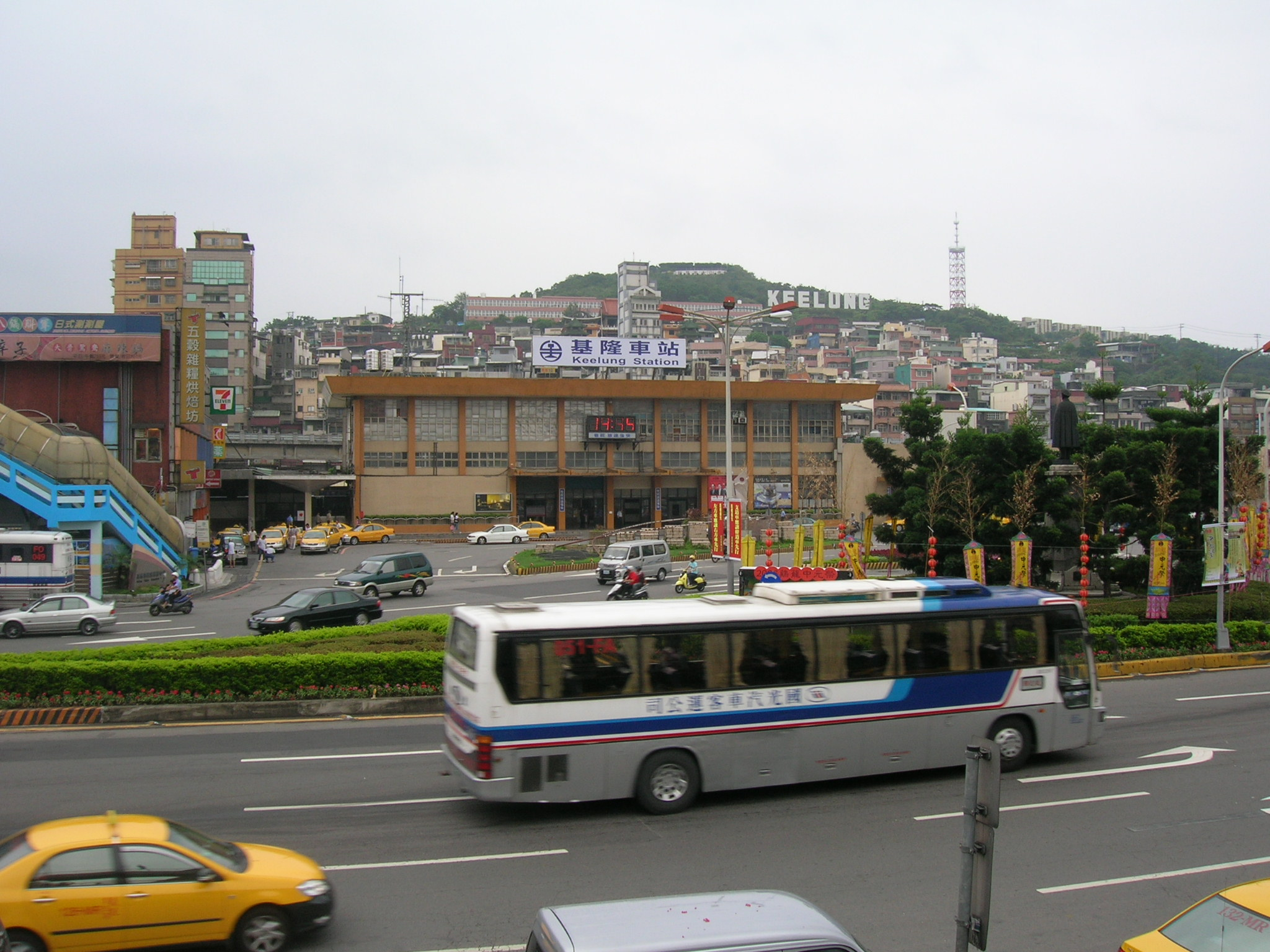 臺灣鐵路管理局基隆車站與站前圓環俯瞰圖。